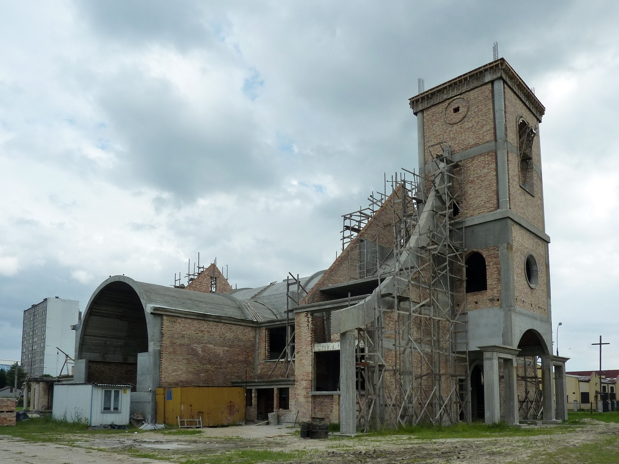 Budowa kościoła Matki Boskiej Fatimskiej w Płocku.